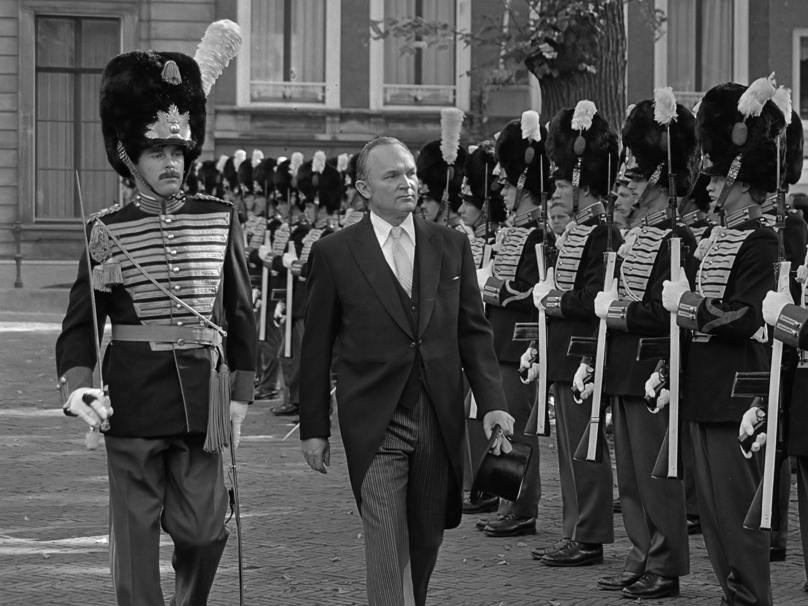 De nieuwe ambassadeur van de Verenigde Staten van Amerika, Z. E. William Jennings Deyss, inspecteert de erewacht van Paleis Lange Voorhout in den Haag 2 september 1981